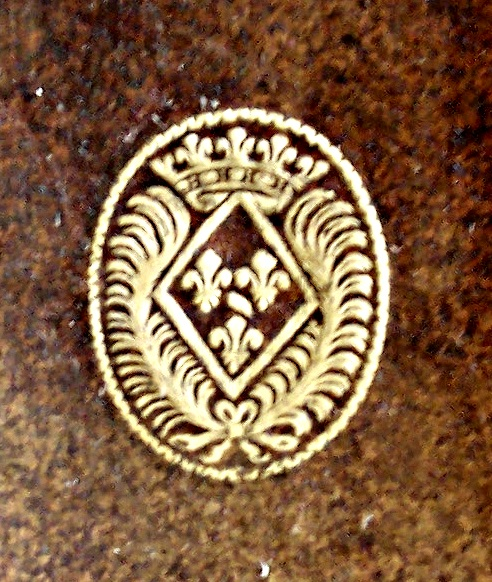 Fer armorié sur un livre de 1721 aux armes de S.A.S. Louise-Adélaïde de Bourbon-Conti (1696-1750), « Mademoiselle de la Roche-sur-Yon », princesse du sang de France. Ecu losangé (demoiselle) timbré d’une couronne de prince français : « de France au bâton péri en bande de gueules à la bordure de gueules » (Bourbon-Conti)